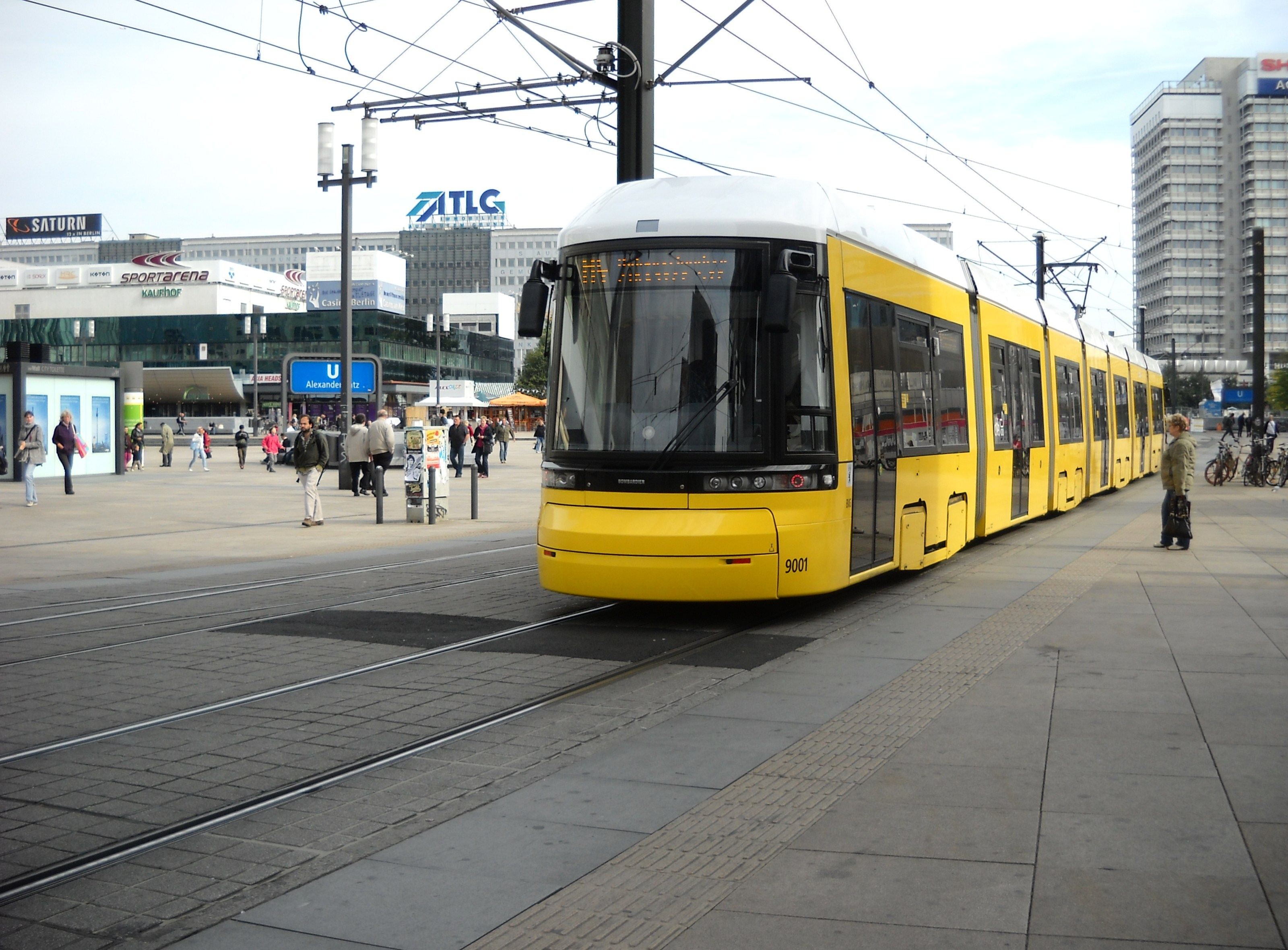 Straßenbahn am Alexanderplatz.